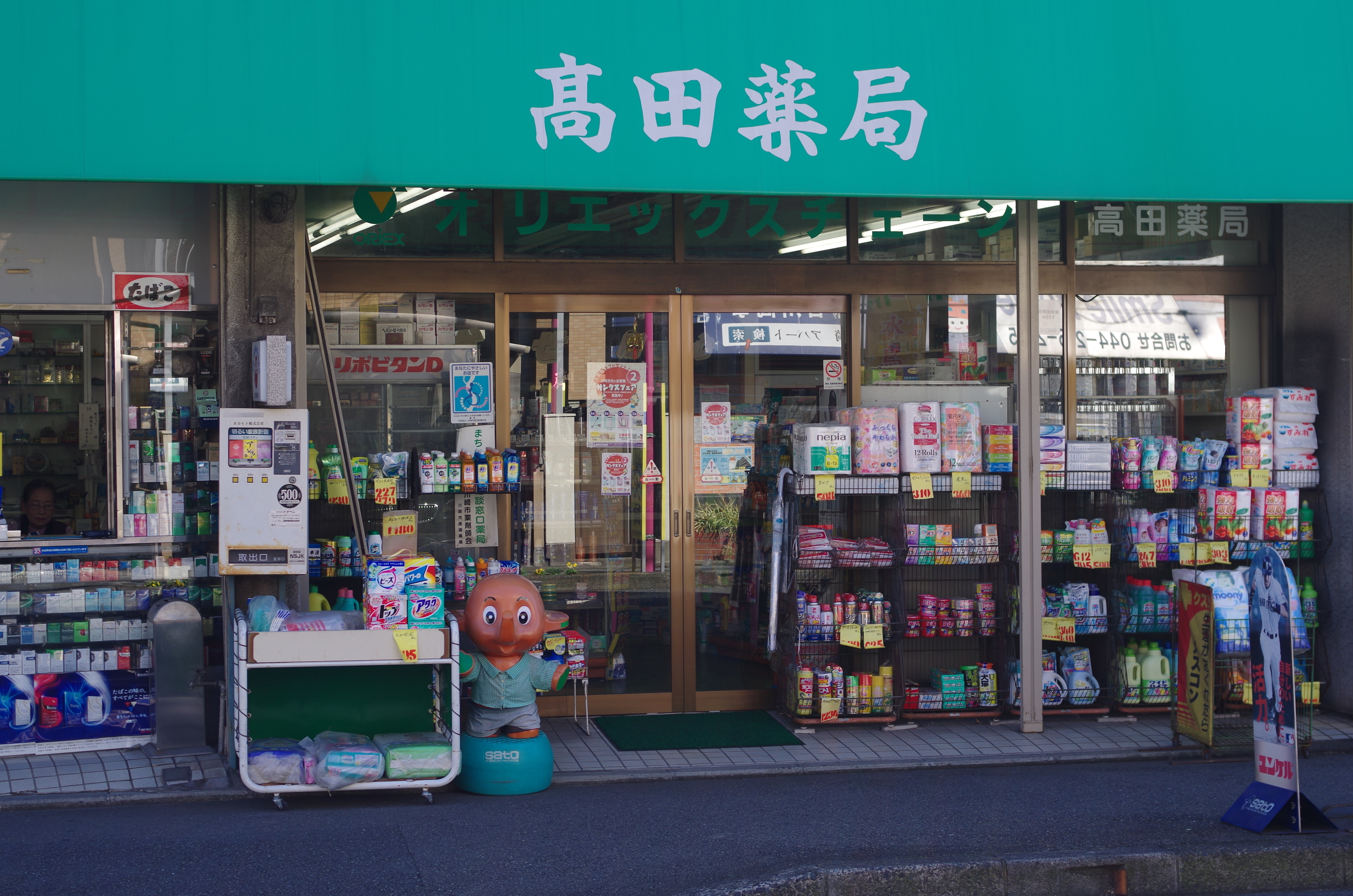 「高田薬局」。川崎市川崎区東門前2-4-4。地図はこちら。